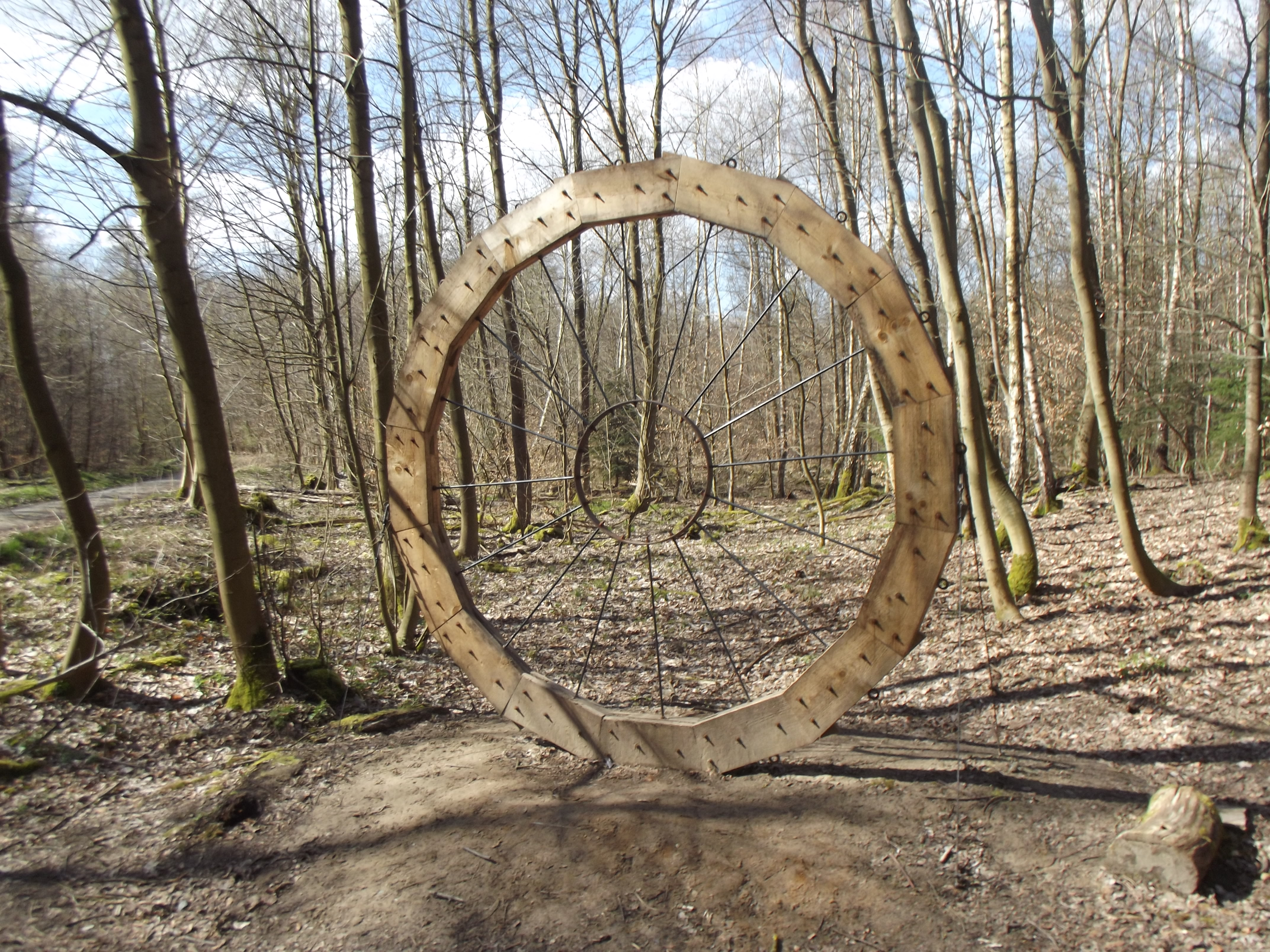 Ri Eung Woo "The Big Wheel"; Internationaler Waldkunstpfad Darmstadt